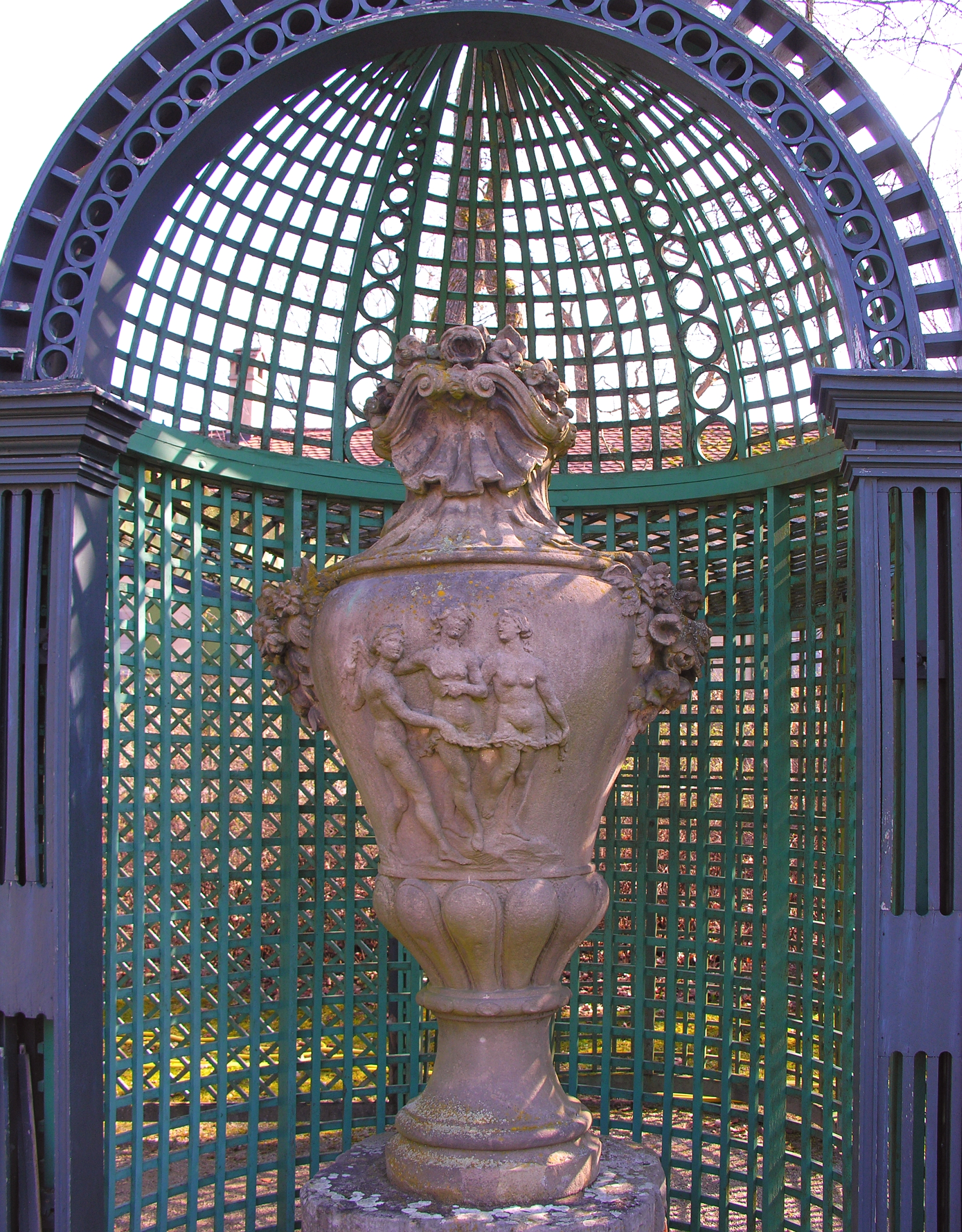 Amphore in den markgräflichen Gartenanlagen der Eremitage in Bayreuth, Bayern - Foto Wolfgang Pehlemann DSCN7048